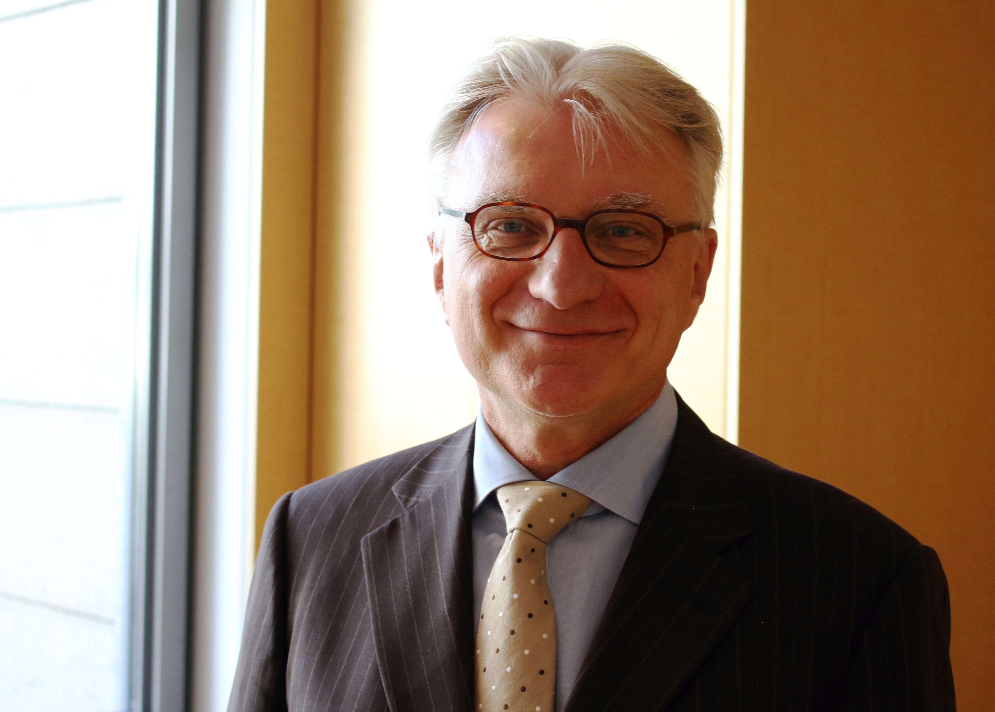 Wolfgang Krieger, 2015 in der Hanns-Seidl-Stiftung, München